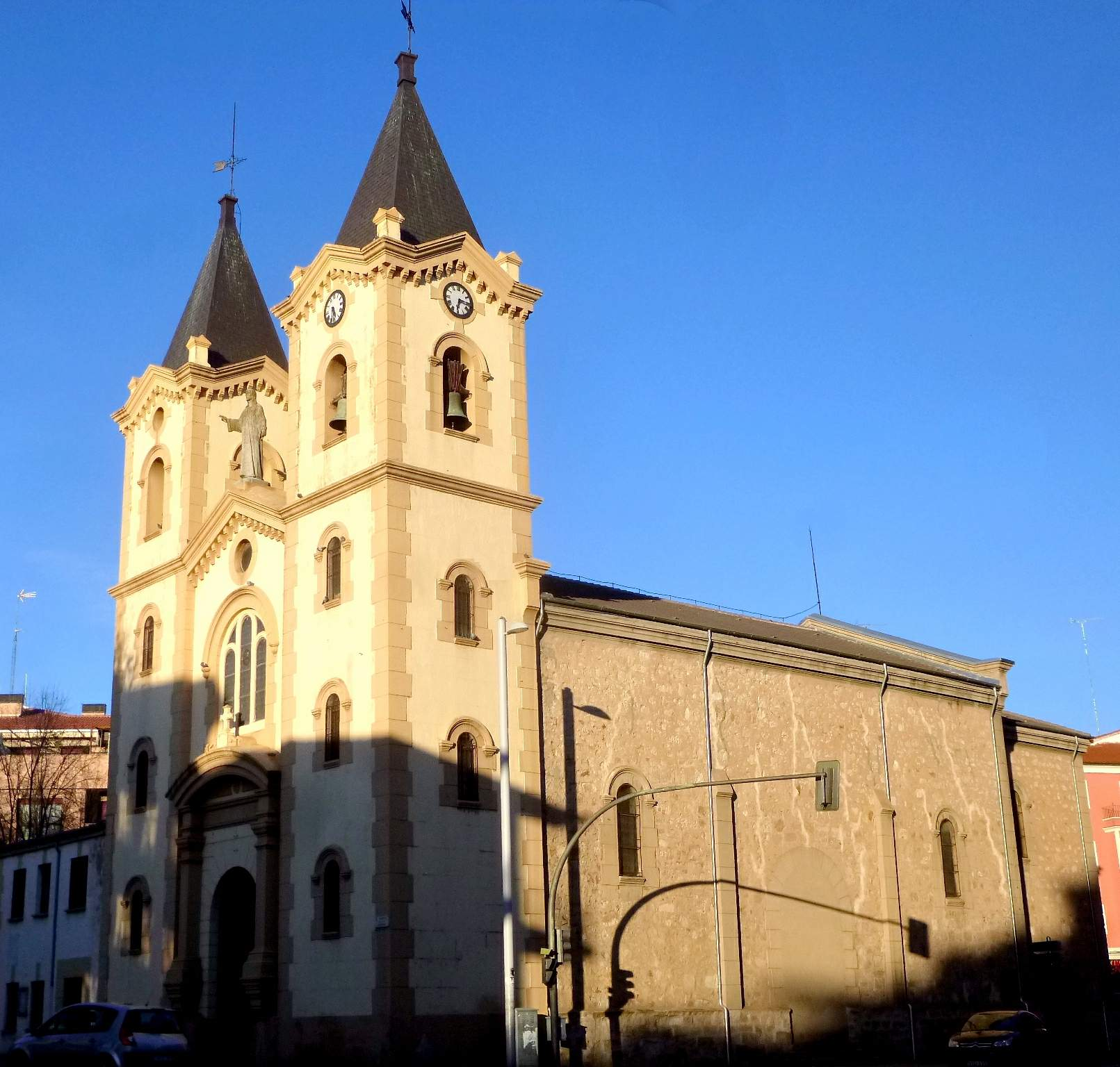 Zamora - Iglesia de San Lázaro.